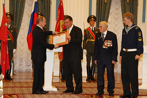 МОСКВА, КРЕМЛЬ. На церемонии вручения грамоты о присвоении Туапсе почётного звания «Город воинской славы».